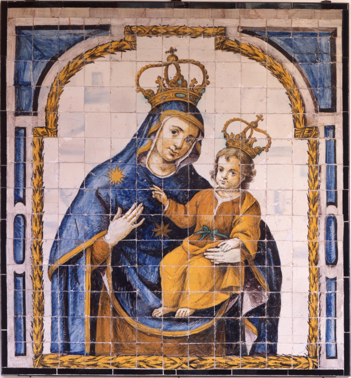 Nuestra Señora del Pópulo, ceramics, 182 x 169 cm.